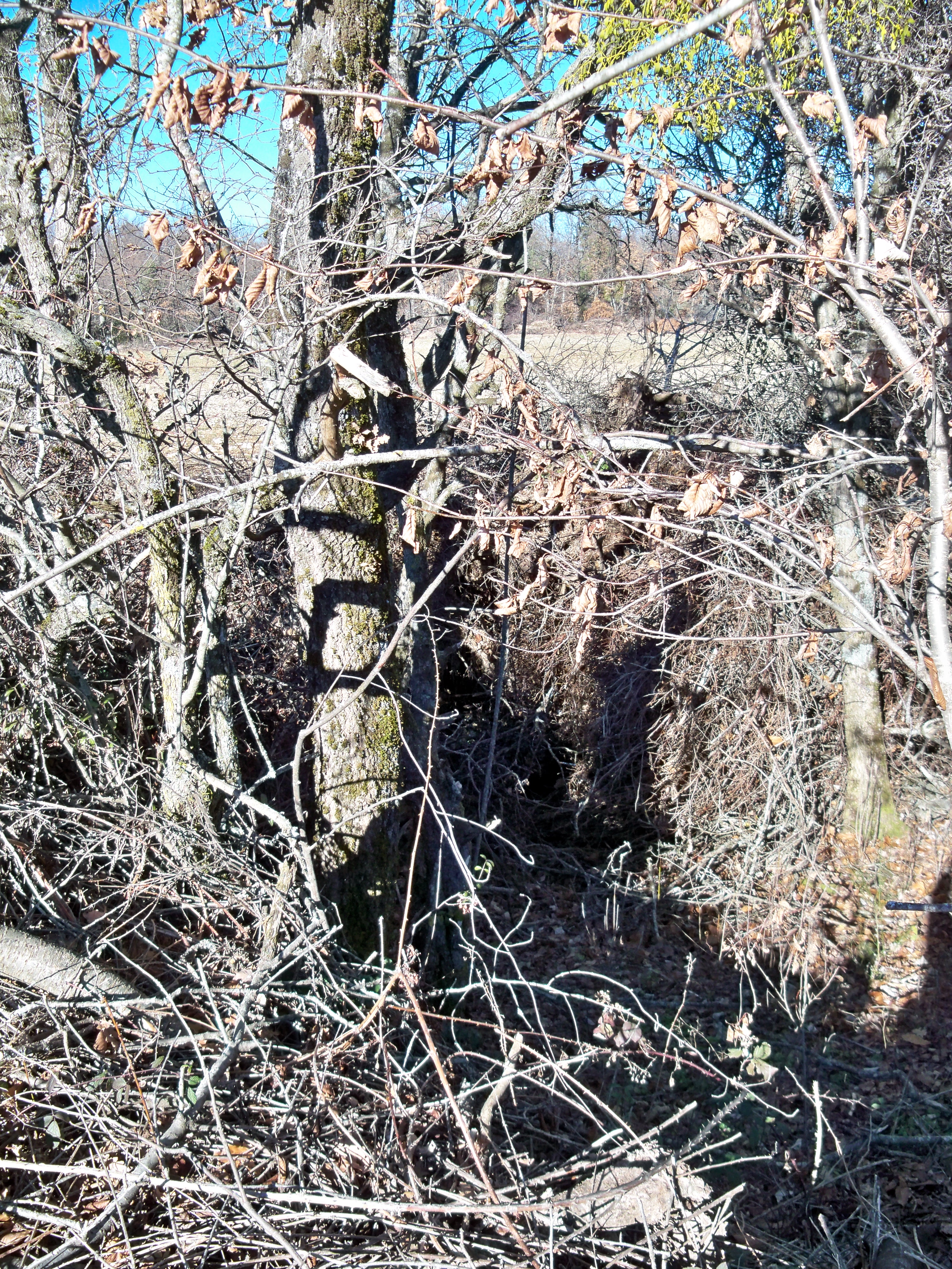 Aven comblé par des branchages à Revest du Bion (04)